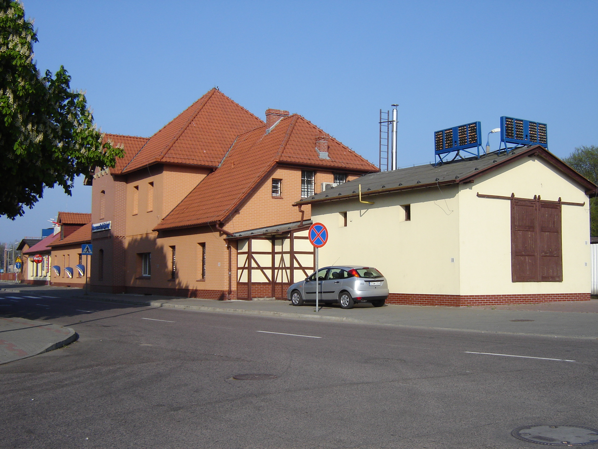 Świnoujście (stacja kolejowa).